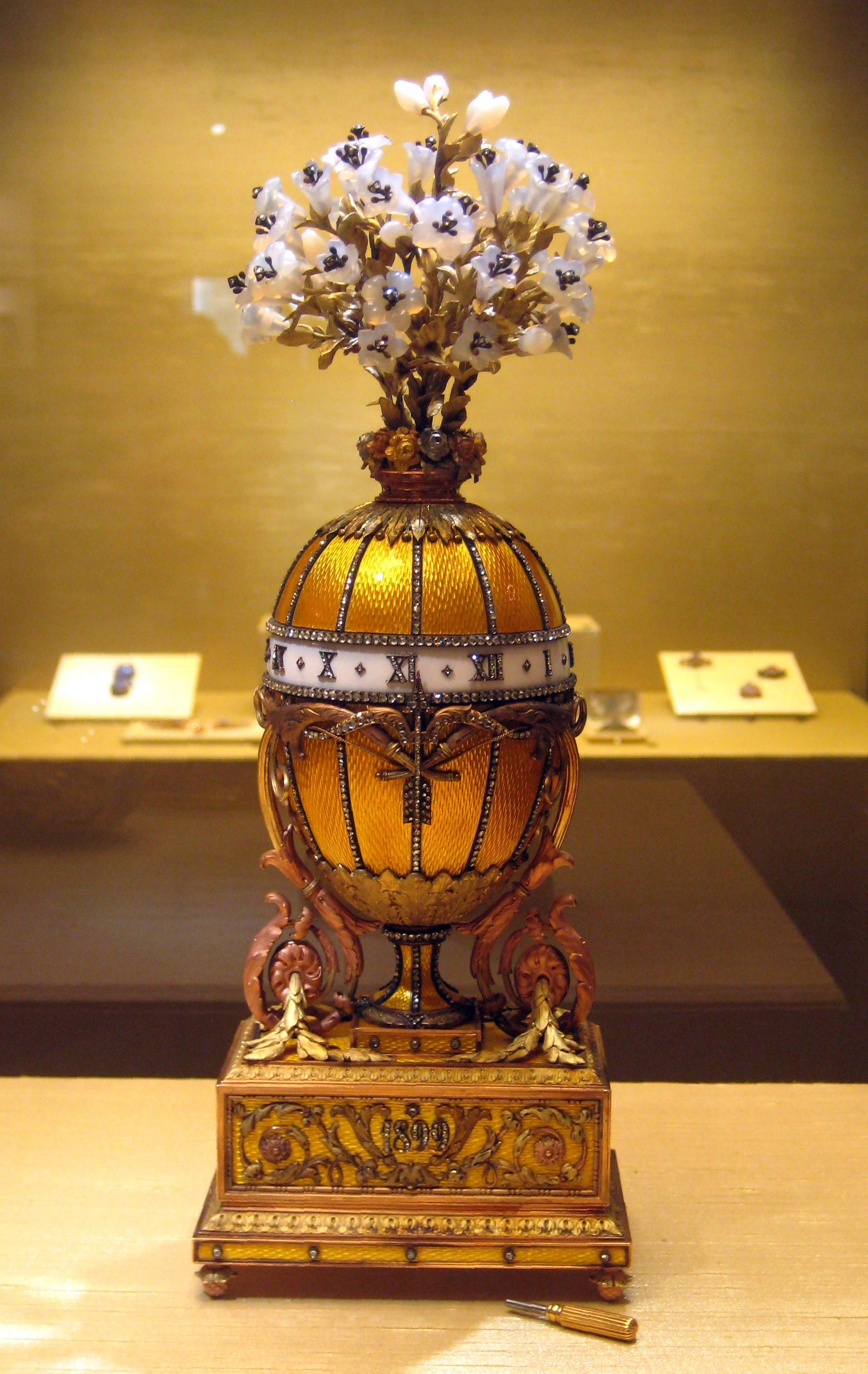 «Часы (Букет лилий)», яйцо Фаберже